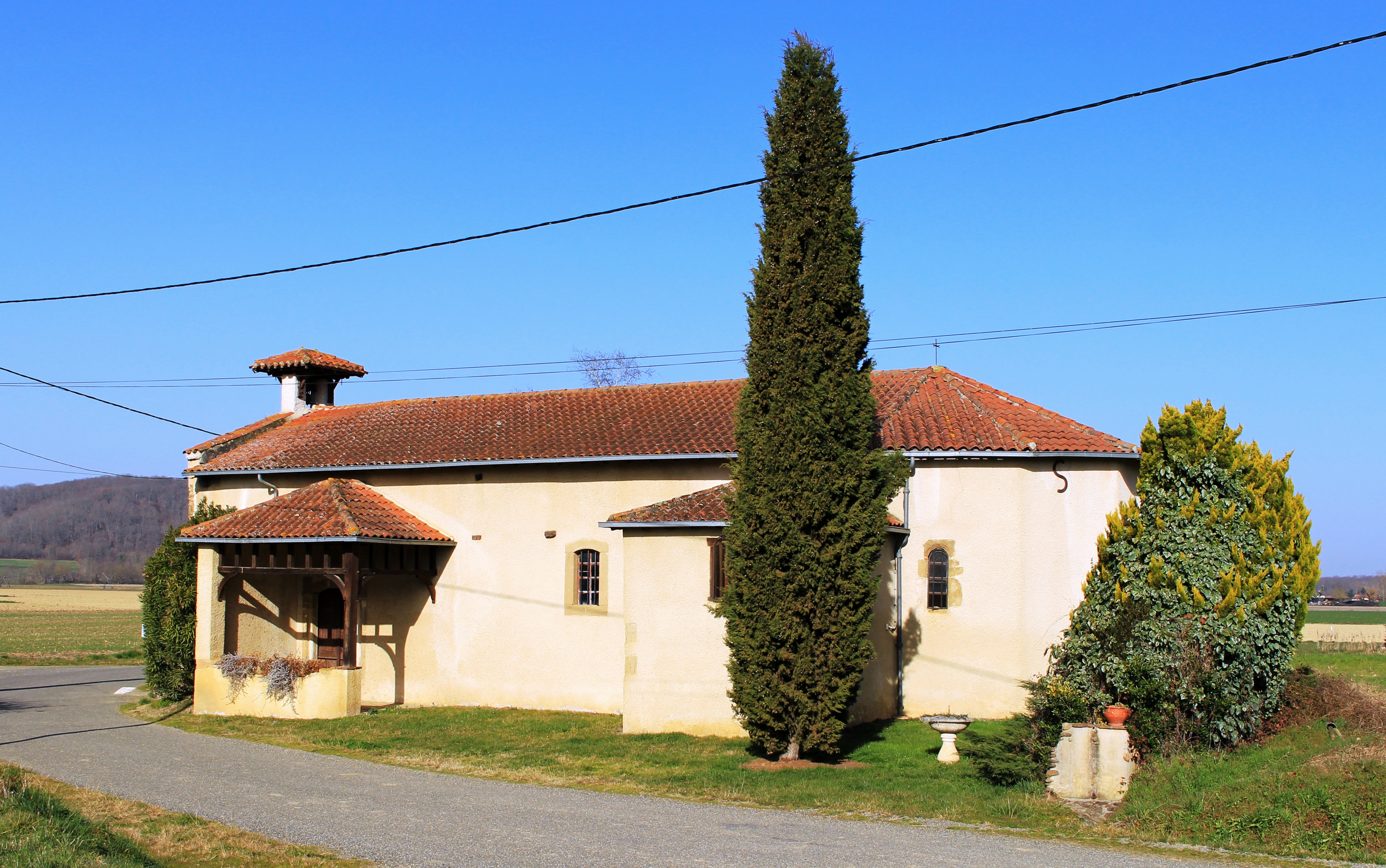 Chapelle Notre-Dame-de-la-Nativité de Labarthe (Hautes-Pyrénées)